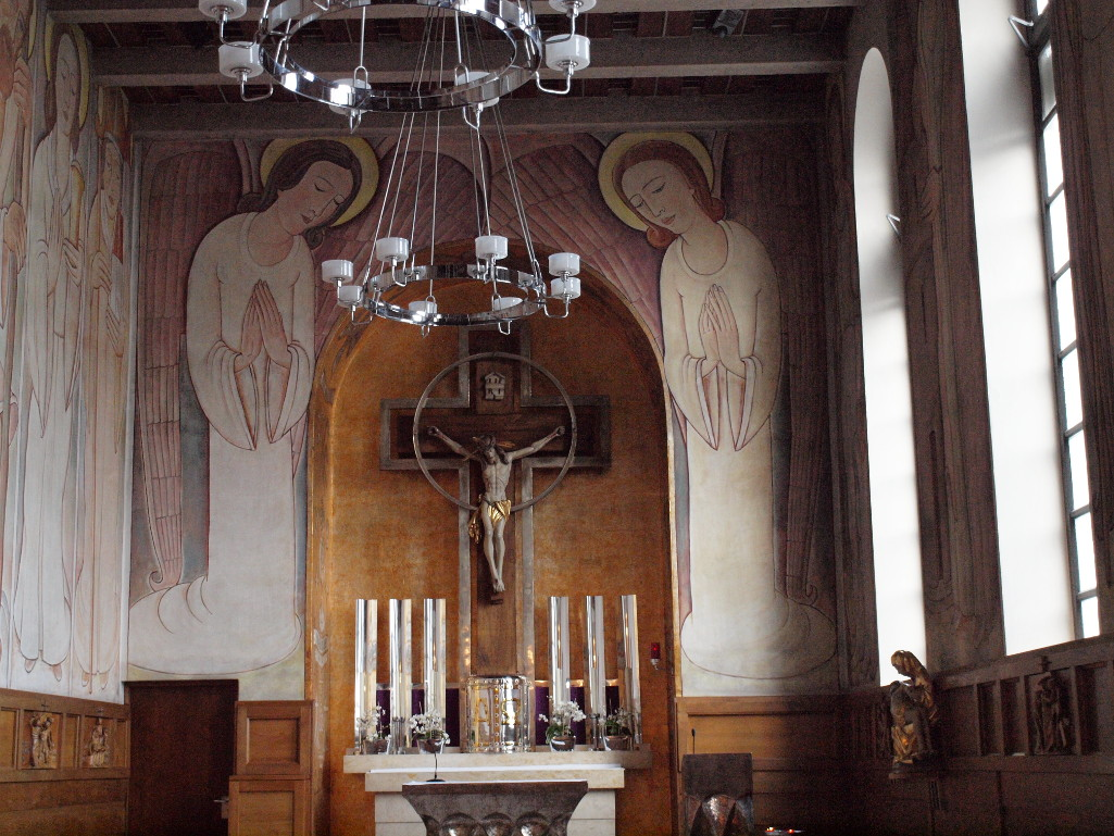 Innenansicht der Krankenhauskapelle des Klinikums Passau